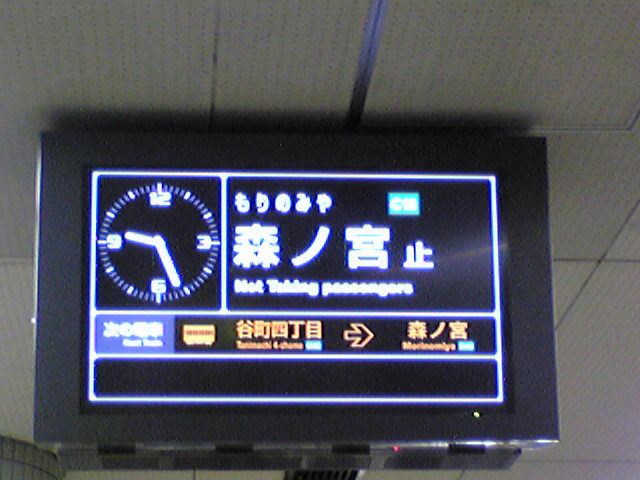 大阪市営地下鉄森ノ宮駅1番線にて撮影した「森ノ宮止」の液晶ディスプレイ